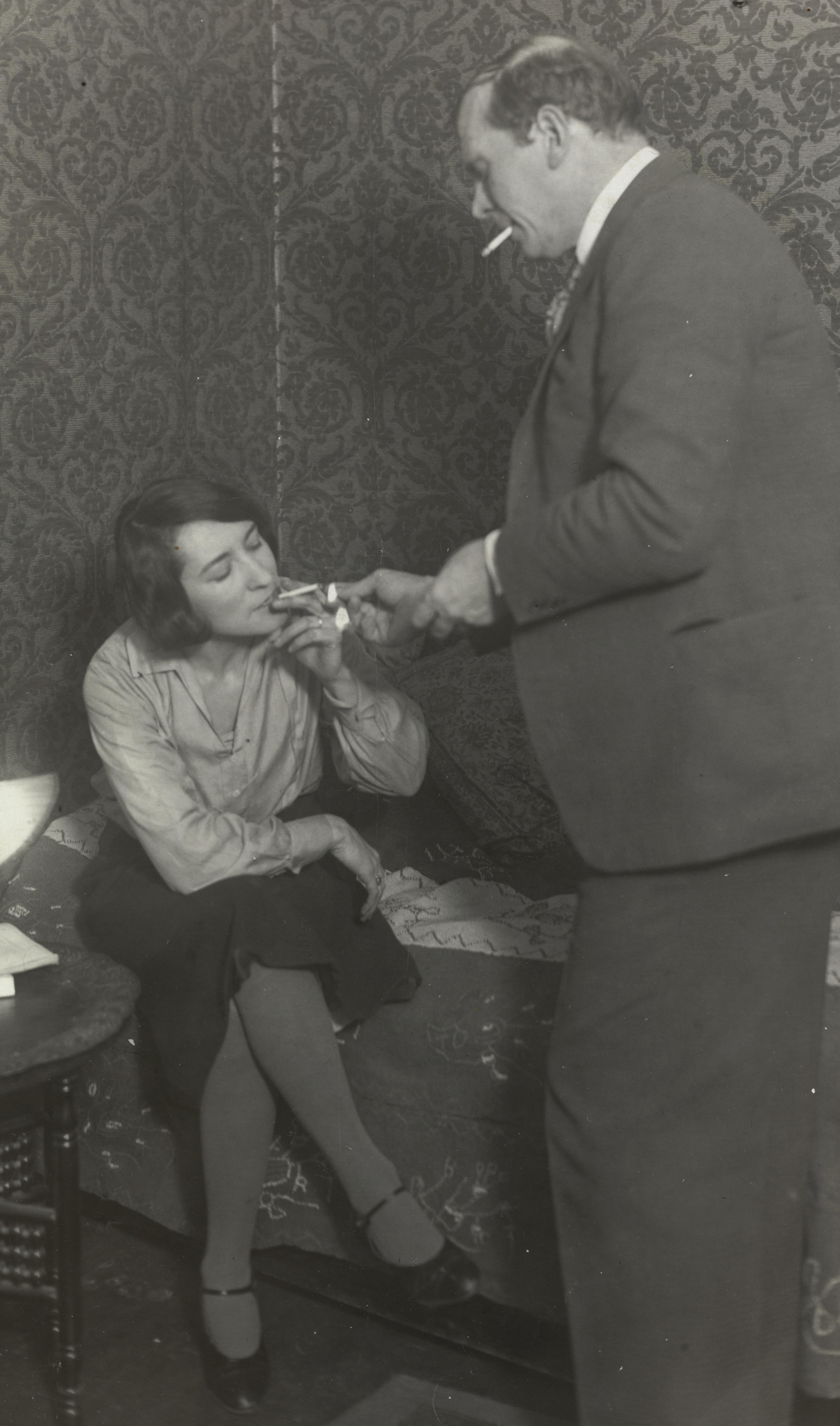 Bildet er hentet fra Nasjonalbibliotekets bildesamling. Anmerkninger til bildet var: Tittel etter påskrift på komponentnr 1 Depicted person: Bull, Olaf